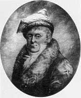 Graf Alexander Franciszek Chodkiewicz